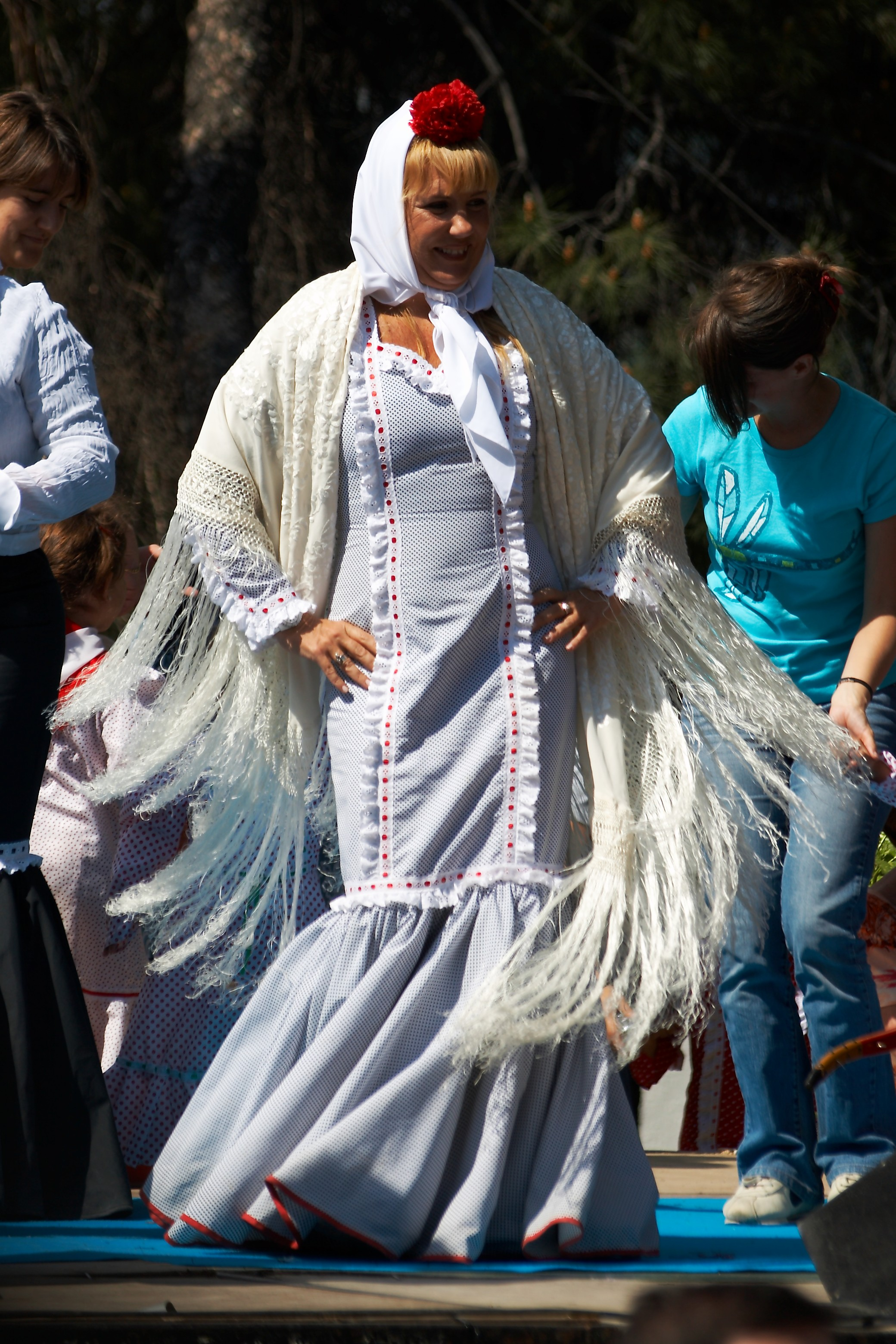 Chulapa. Fiestas de San Isidro 2007, Madrid, España.